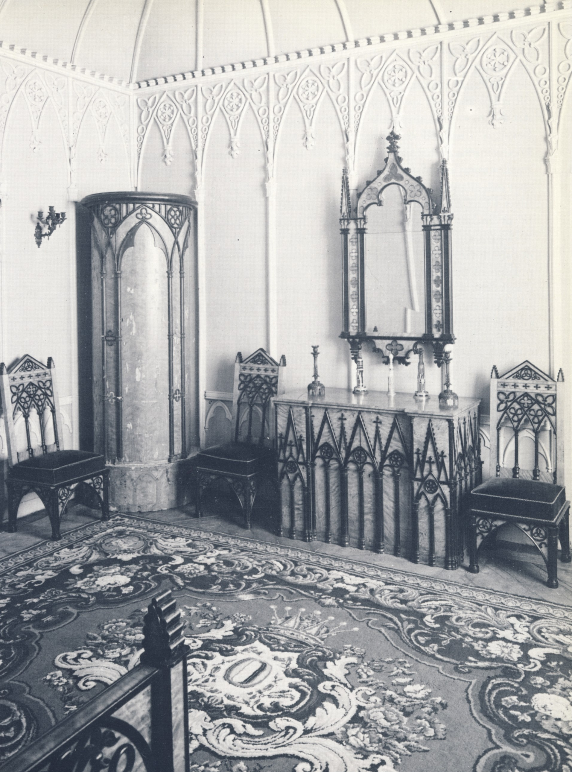 Oakar I:s götiska rum på Stockholms slott tillfälligt inredd med urspruingliga möbler